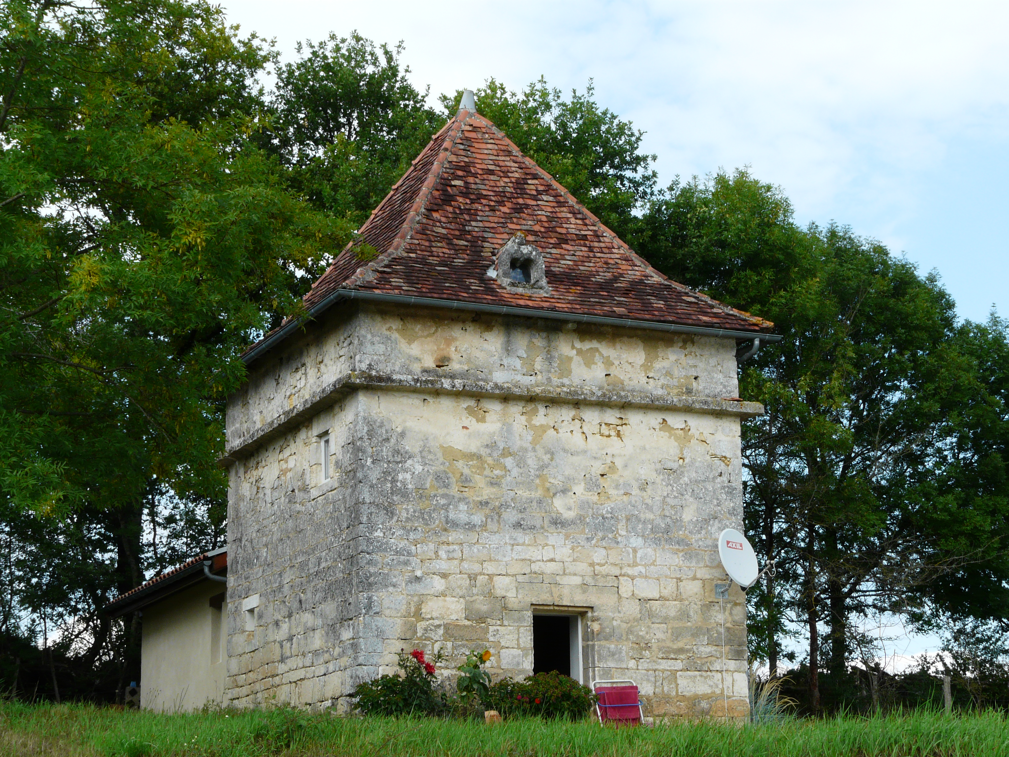 Le pigeonnier de la Calonie, Cercles, Dordogne, France.